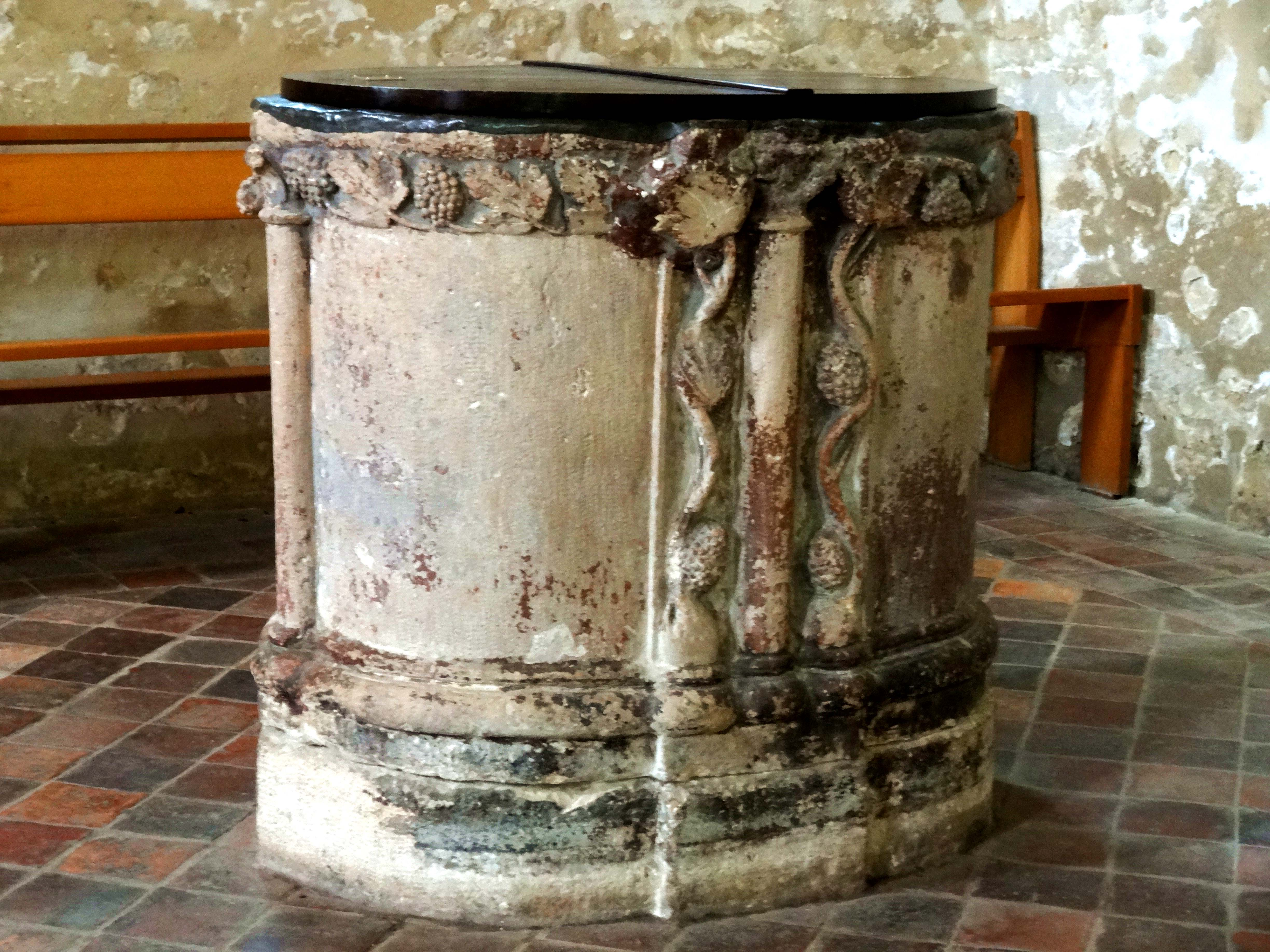 Mobilier de l'église - voir titre.